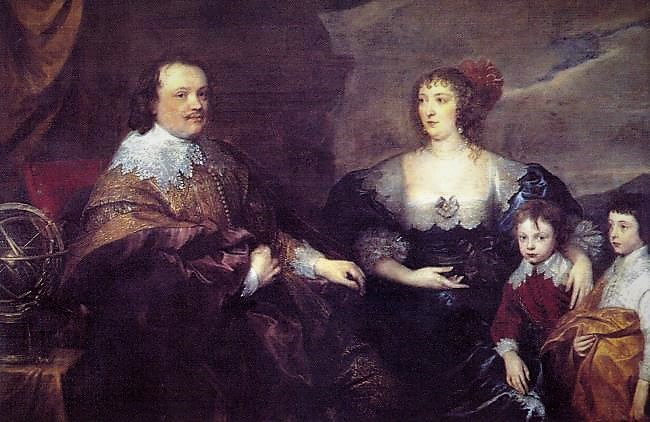 Sir Kenelm Digby, Lady Venetia Digby e loro figli